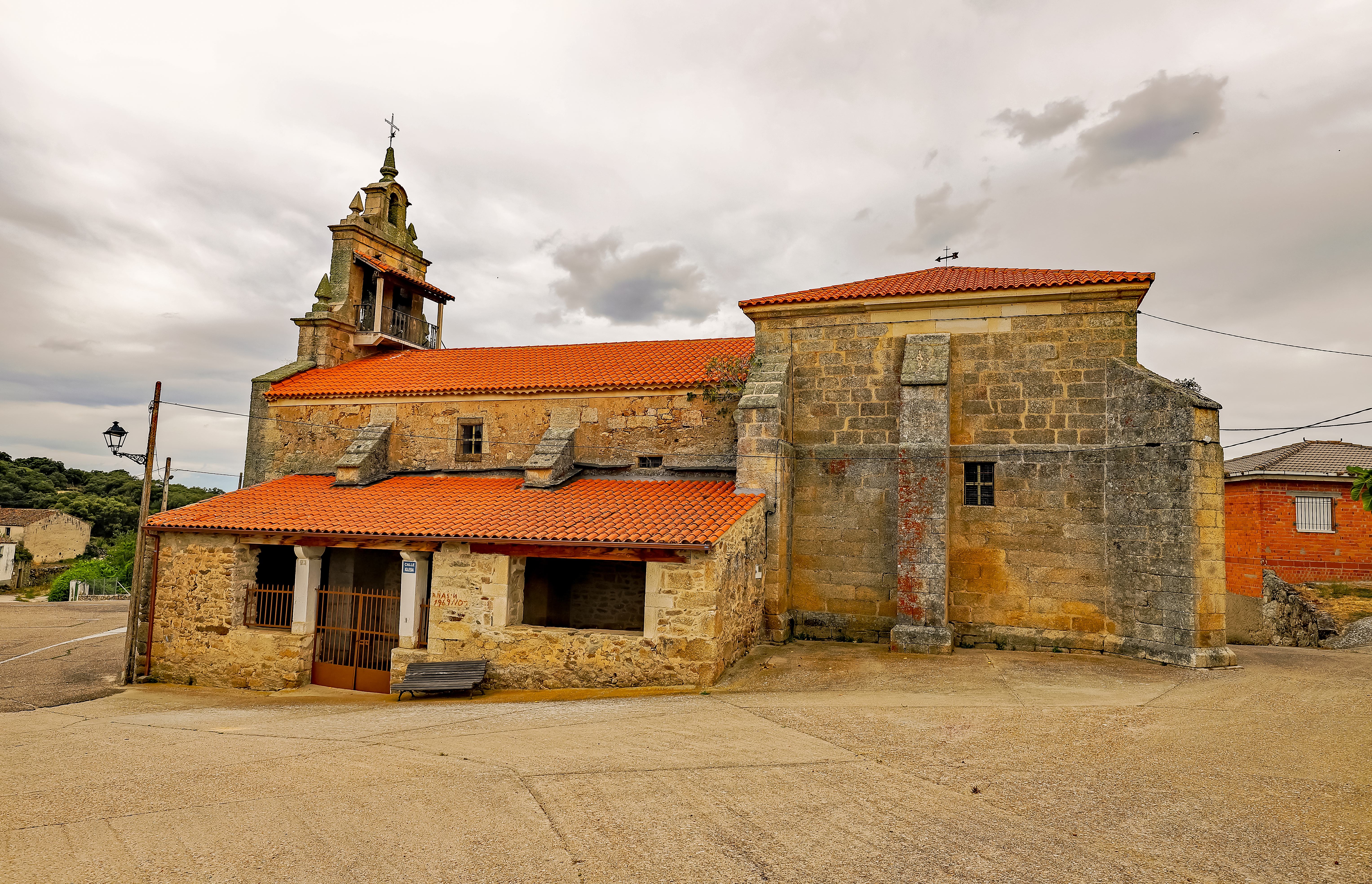 Pino del Oro es un municipio de la comarca de Aliste y de la provincia de Zamora.